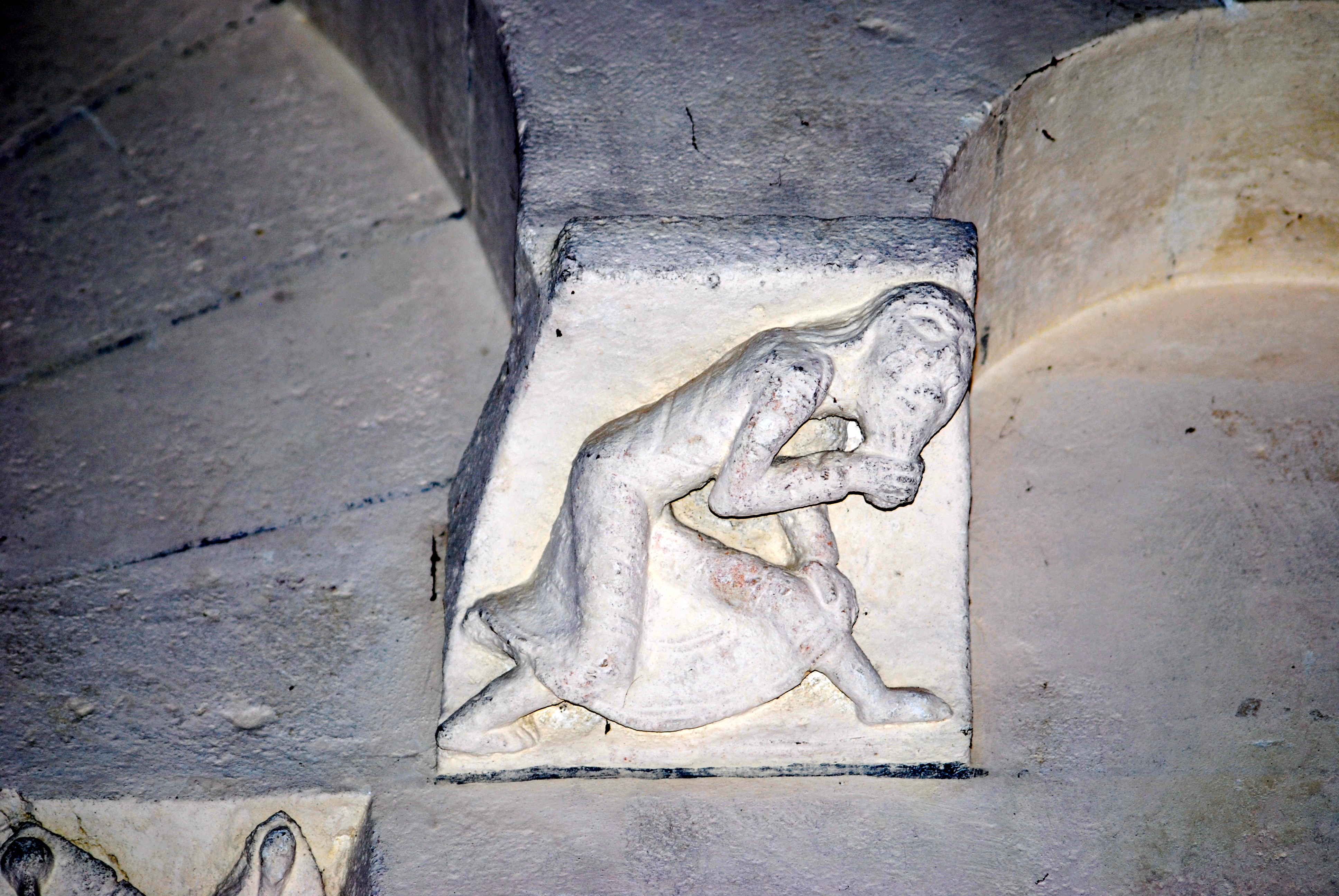 Langoiran Eglise St Pierre Chevet